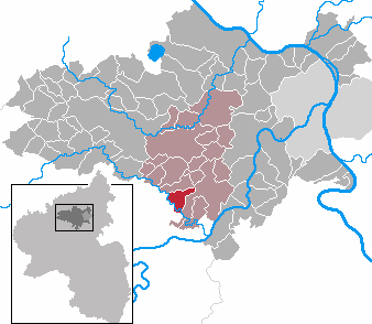 Pillig in Rhineland-Palatinate - district Mayen-Koblenz